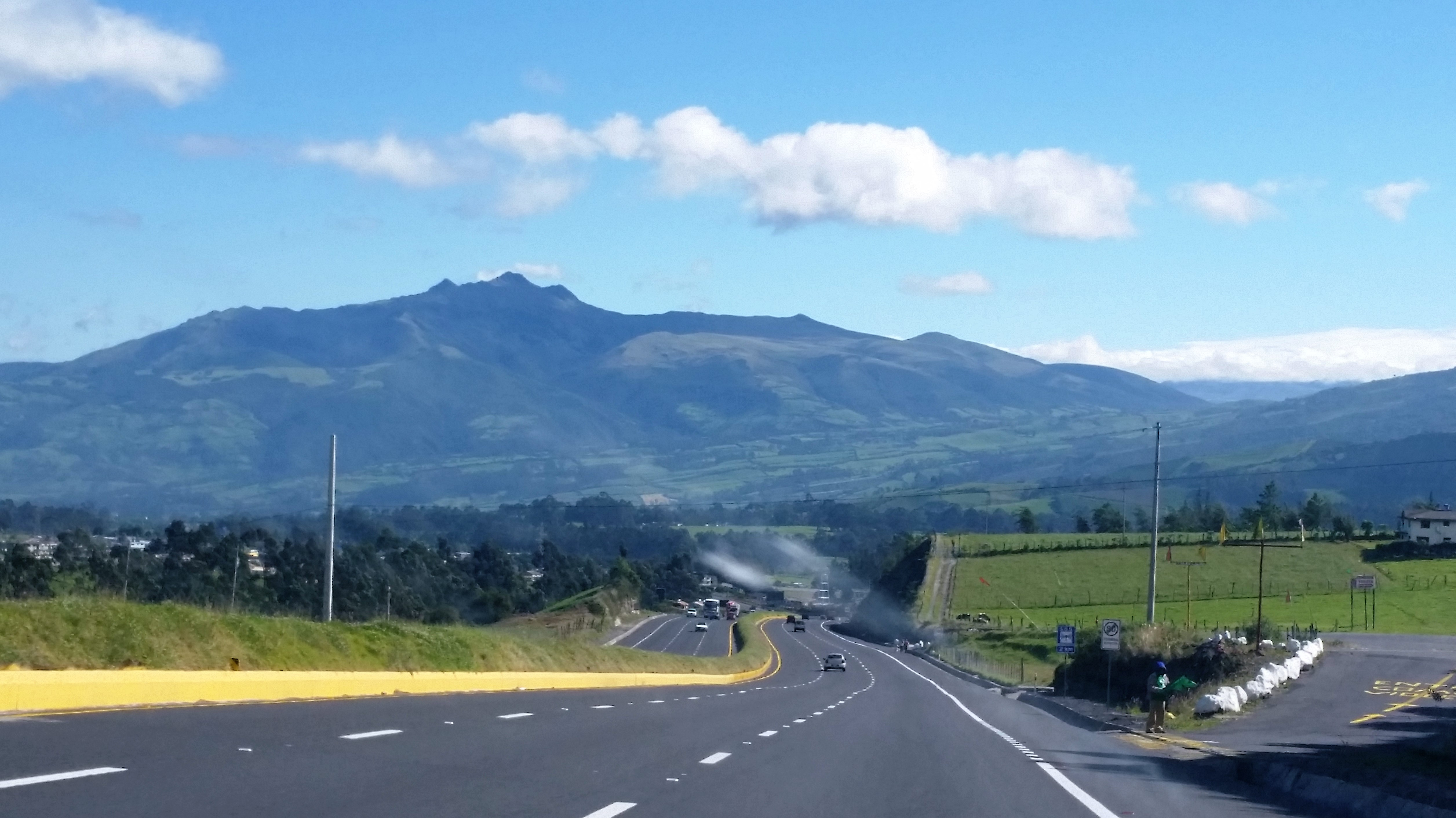 Carretera Panamericana del Ecuador (E35), tramo entre Machachi y Latacunga